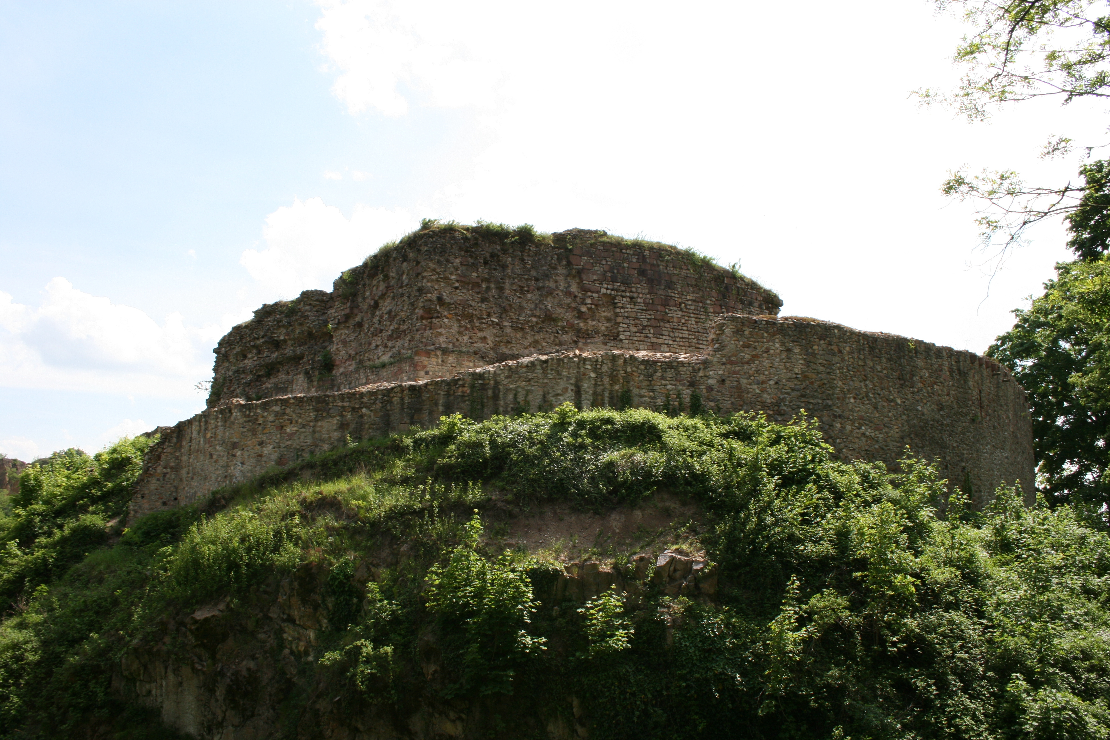 Ruine Schauenburg bei Dossenheim, Ansicht der Kernburg von Osten.